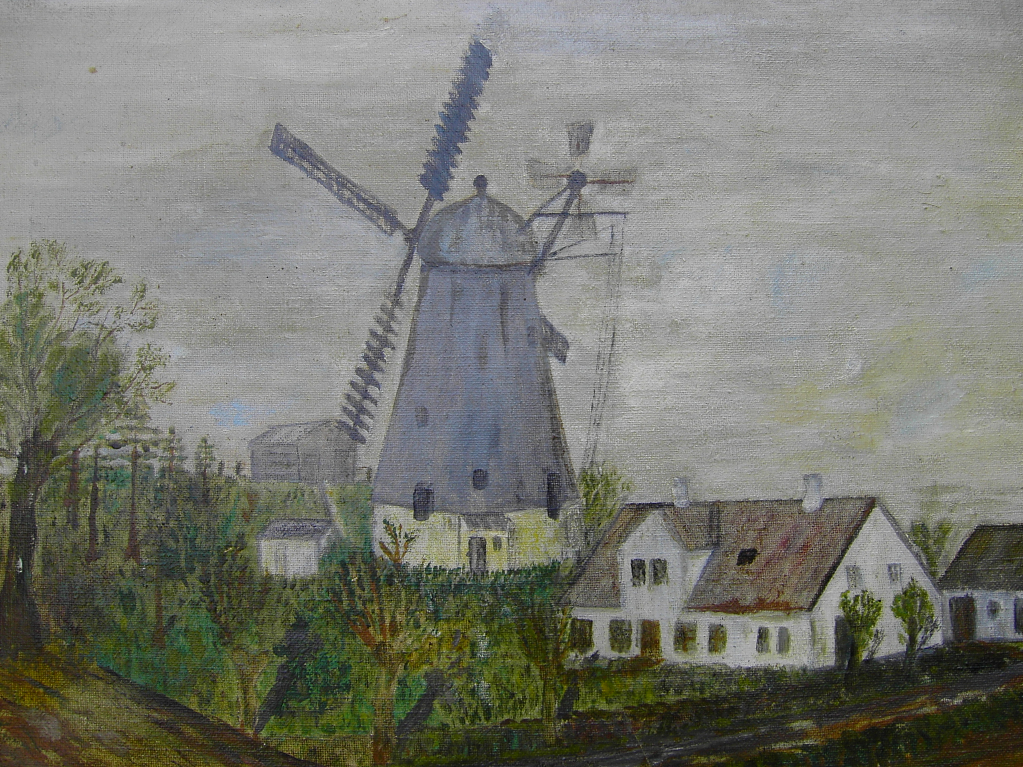 Afbildning af gammelt naivistisk maleri af Hine Mølle